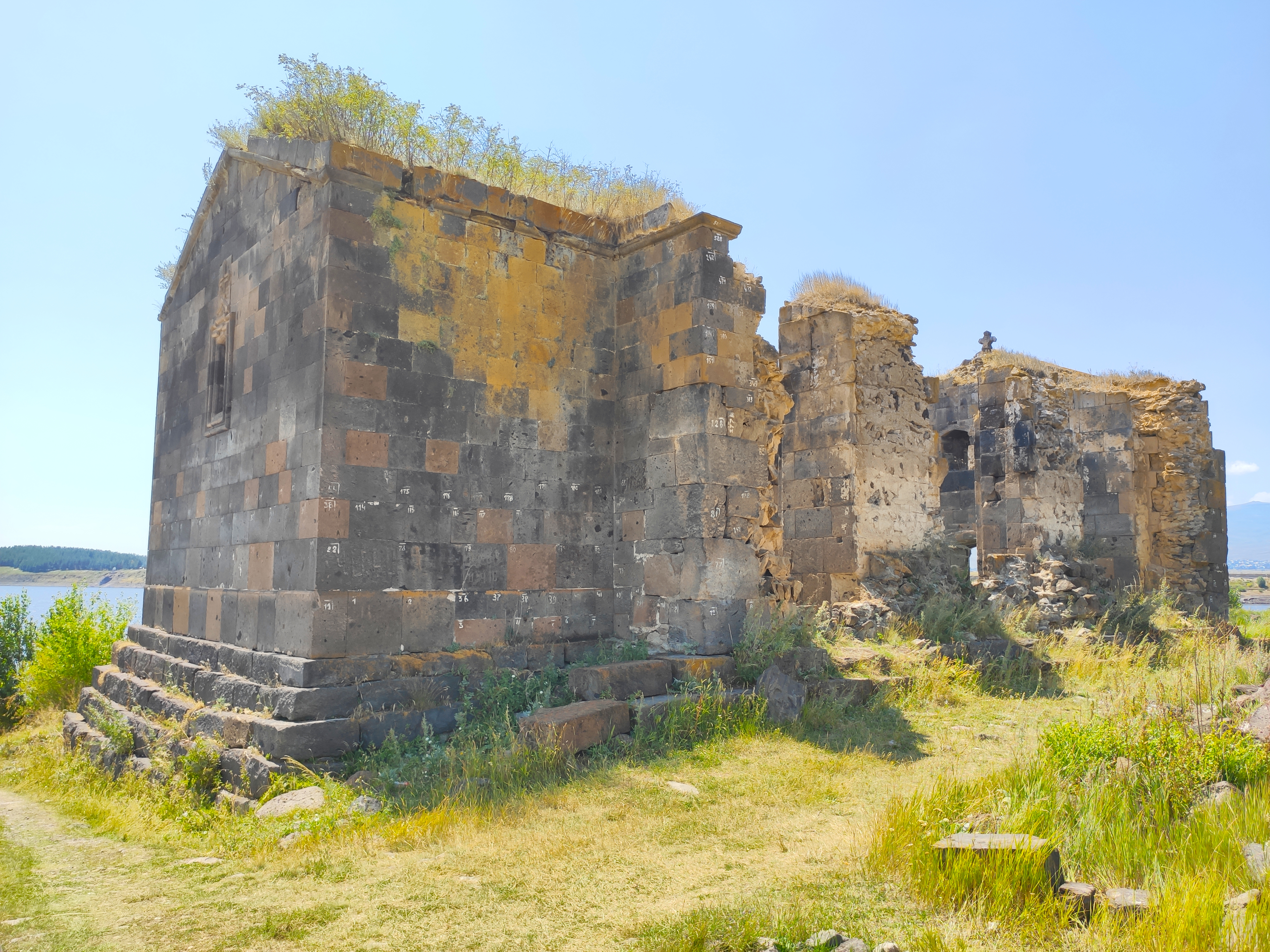 Ս․ Պողոս-Պետրոս եկեղեցին Զովունի հին բնակատեղիում